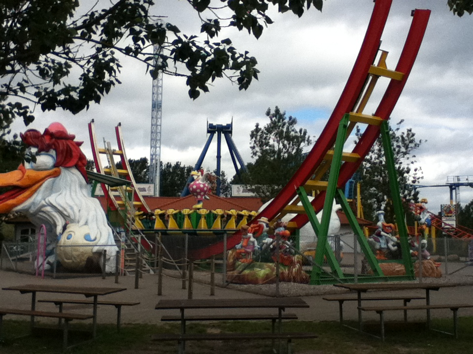 BonBon-Lands forlystelse Alba-Tossen fik ny bemaling til sæson 2011.